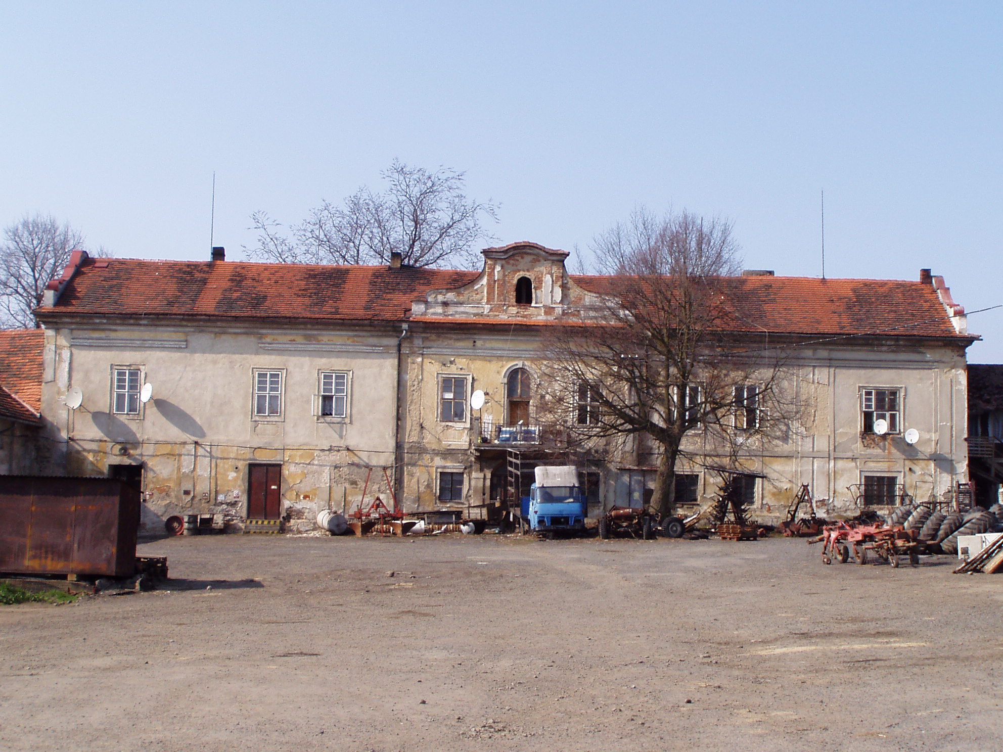 Současný stav zámku v Měčíně, PD-self